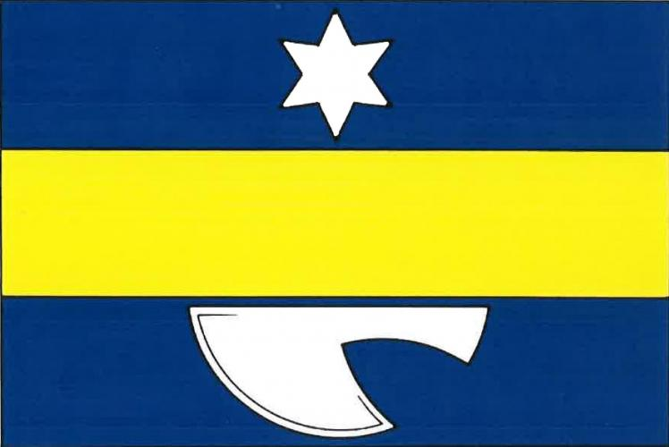 Hartinkov vlajka